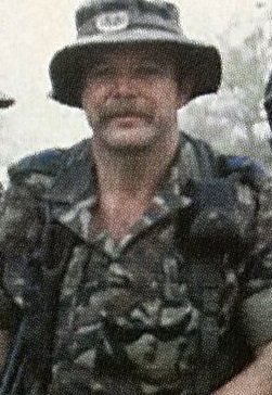 ロバート・C・マッケンジー (切り抜き)